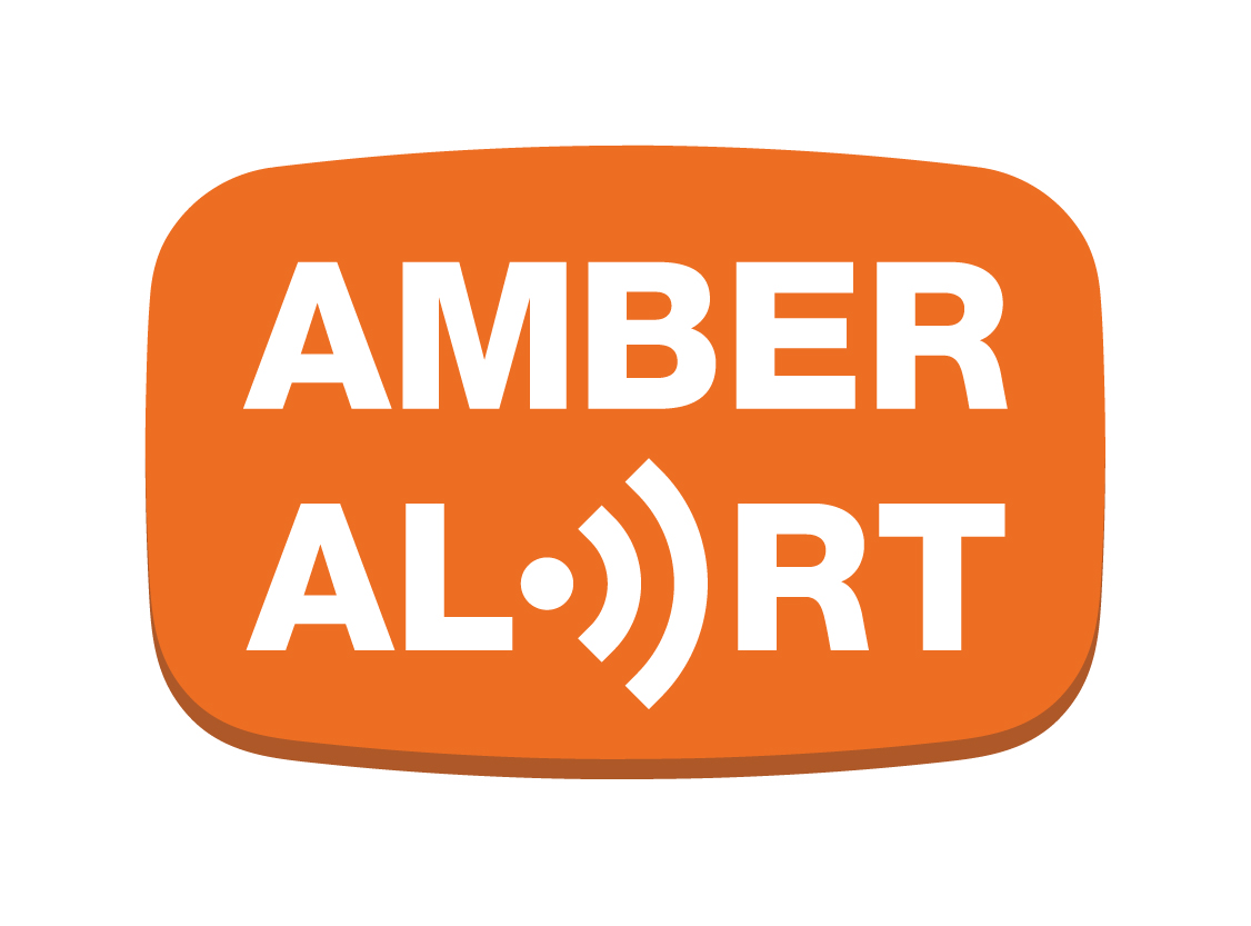 Logo AMBER Alert Nederland